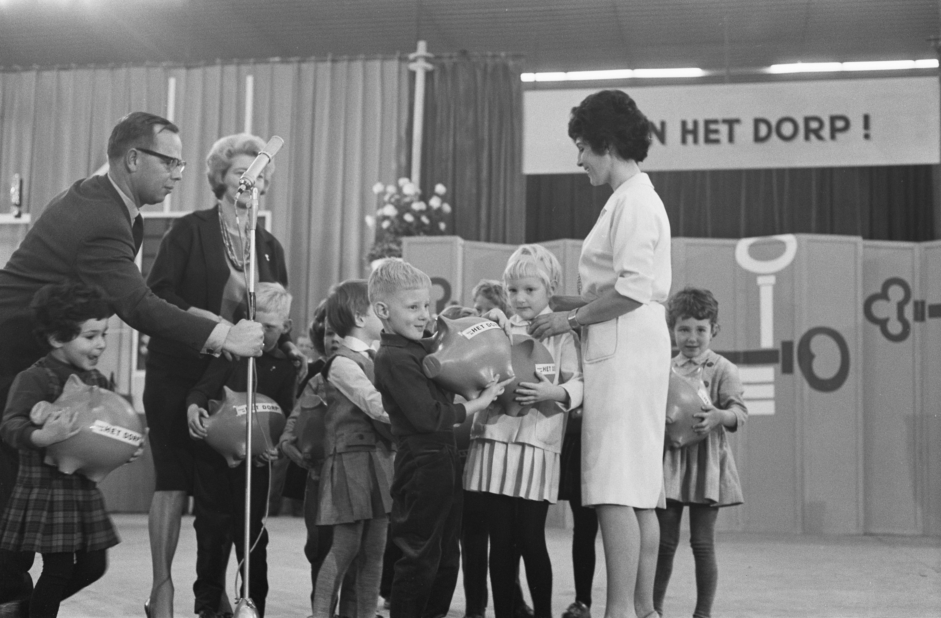 Collectie / Archief : Fotocollectie Anefo Reportage / Serie : Actie Open het dorp Beschrijving : Mies Bouwman met kleuters Datum : 27 november 1962 Trefwoorden : kleuters Persoonsnaam : Bouwman, Mies Fotograaf : Fotograaf Onbekend / Anefo Auteursrechthebbende : Nationaal Archief Materiaalsoort : Negatief (zwart/wit) Nummer archiefinventaris : bekijk toegang 2.24.01.05 Bestanddeelnummer : 914-5504